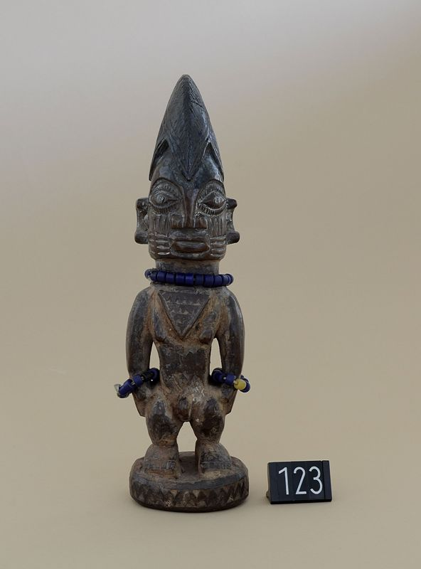 Statua Ibeji - Figura di colorazione rossastra in posizione eretta poggiante su base circolare con decorazione a spina di pesce; gli arti sono disposti simmetricamente, le mani poggianti sui fianchi, il sesso in evidenza. Sul petto è inciso un medaglione. Il volto segato da incisioni (scarificazioni); acconciatura a cresta di colore blu indaco. Collana al collo e bracciali di perline ai polsi. Le statuette ibej rappresentano i gemelli. Presso gli Yoruba in epoca precoloniale, la nascita di gemelli era considerata un evento nefasto, un'intrusione dell'animalità nella sfera della riproduzione umana; per questo i gemelli venivano abbandonati riconsegnadoli alla boscaglia da cui si riteneva provenissero. In epoca più recente il significato si è capovolto facendone un segno benaugurante e dando vita a un culto dei gemelli. In caso di morte di uno o di entrambi i gemelli, la madre fa scolpire queste statuette di cui si prende cura, lavandole, vestendole e nutrendole, in quanto depositarie dello spirito dei figli defunti. Alla sua morte verranno trasmesse a una delle figlie. I gemelli conservano comunque un lato oscuro: il culto che si rivolge loro serve a placarne lo spirito.